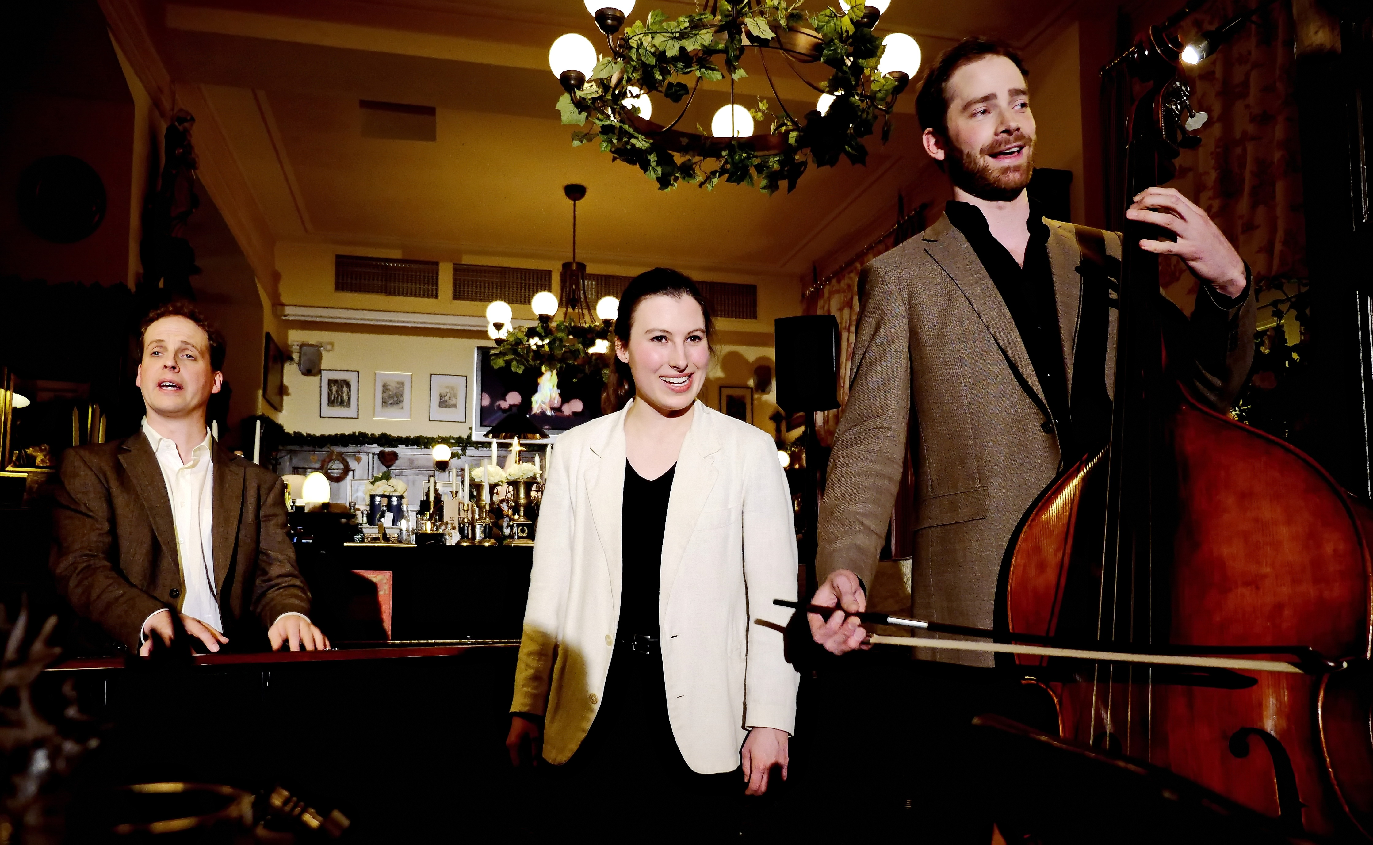 Riscant